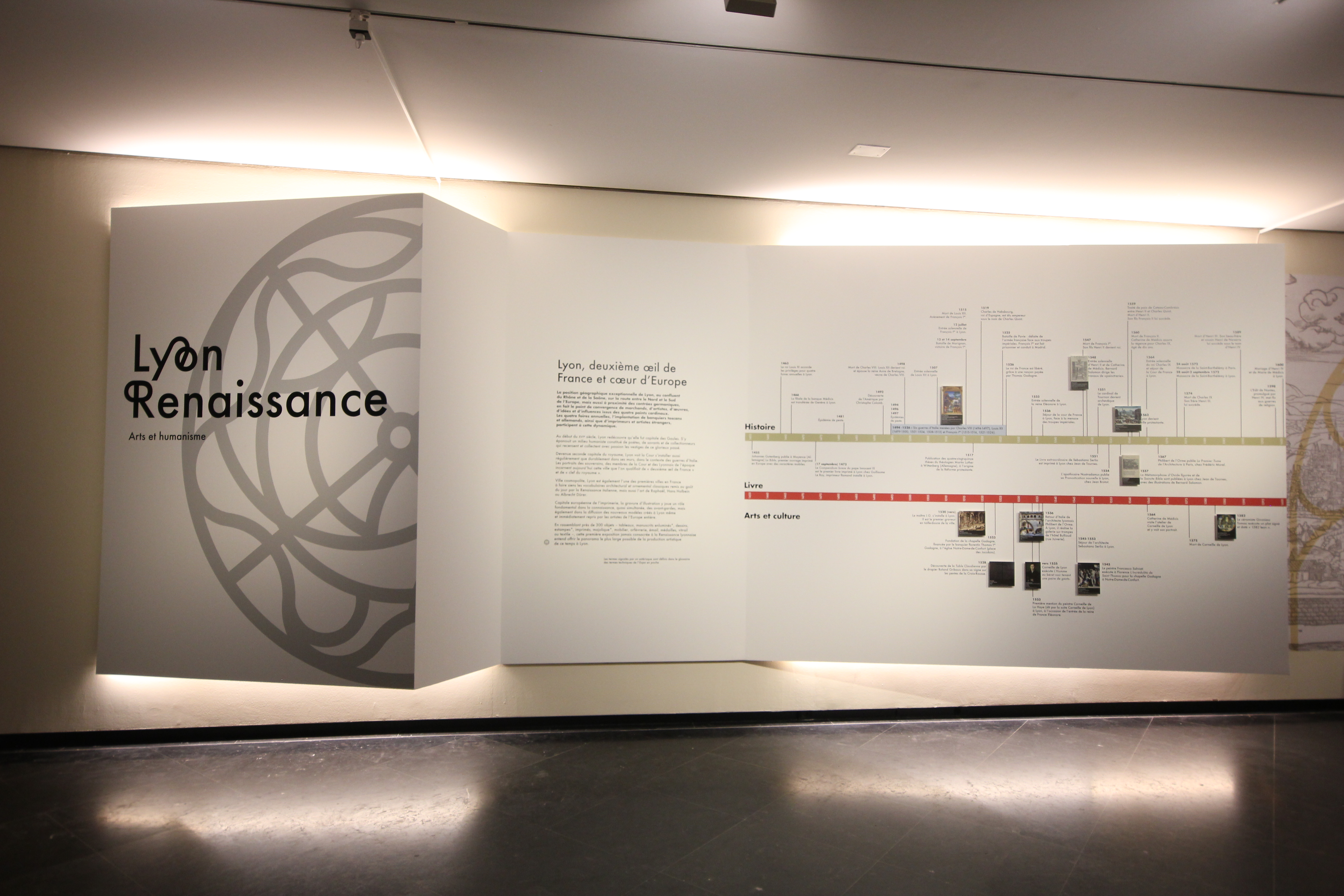 Musée des Beaux-Arts de Lyon - Exposition Lyon Renaissance - Vue des salles